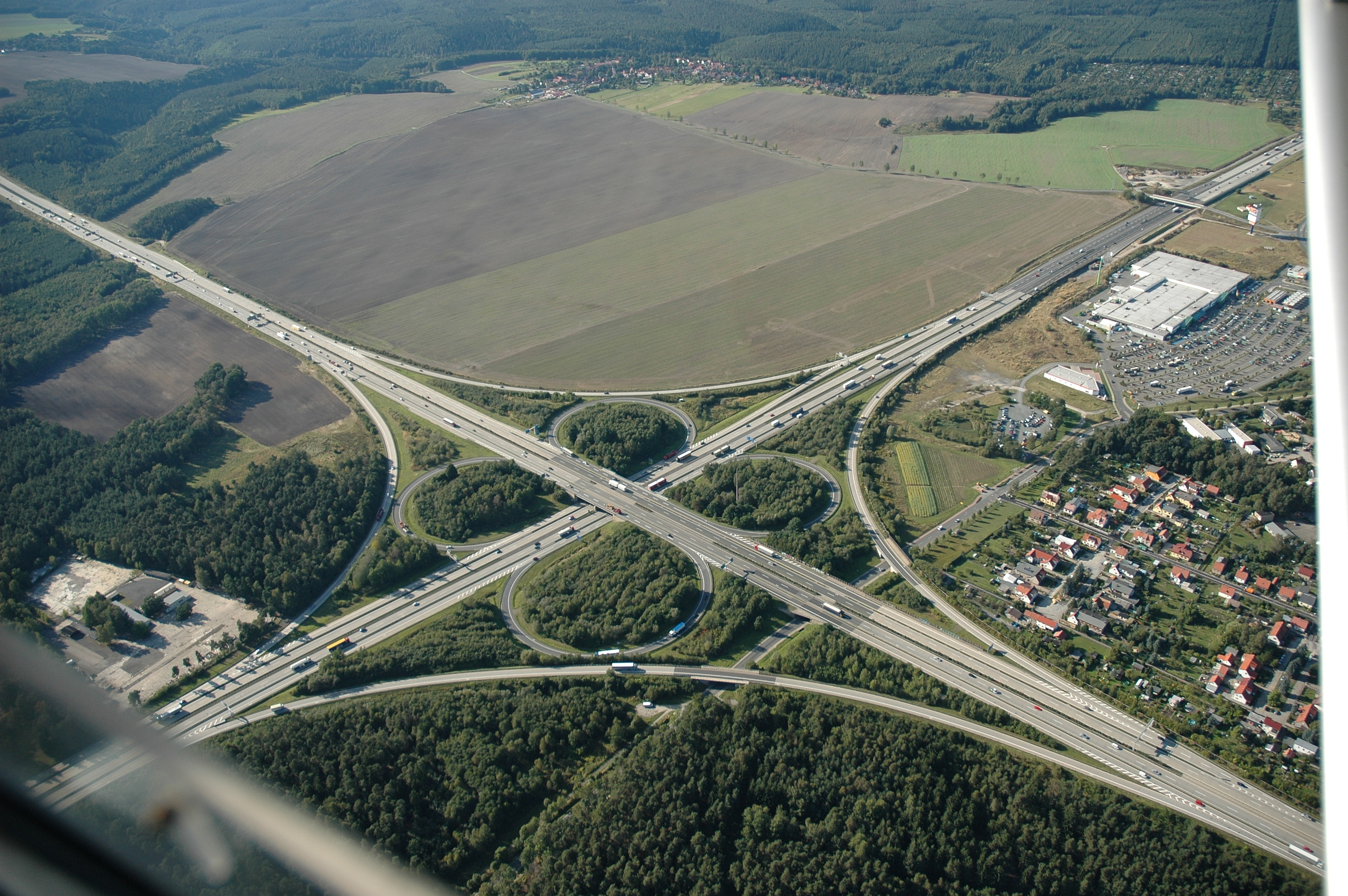 Hermsdorfer Kreuz Autobahn A4 A9